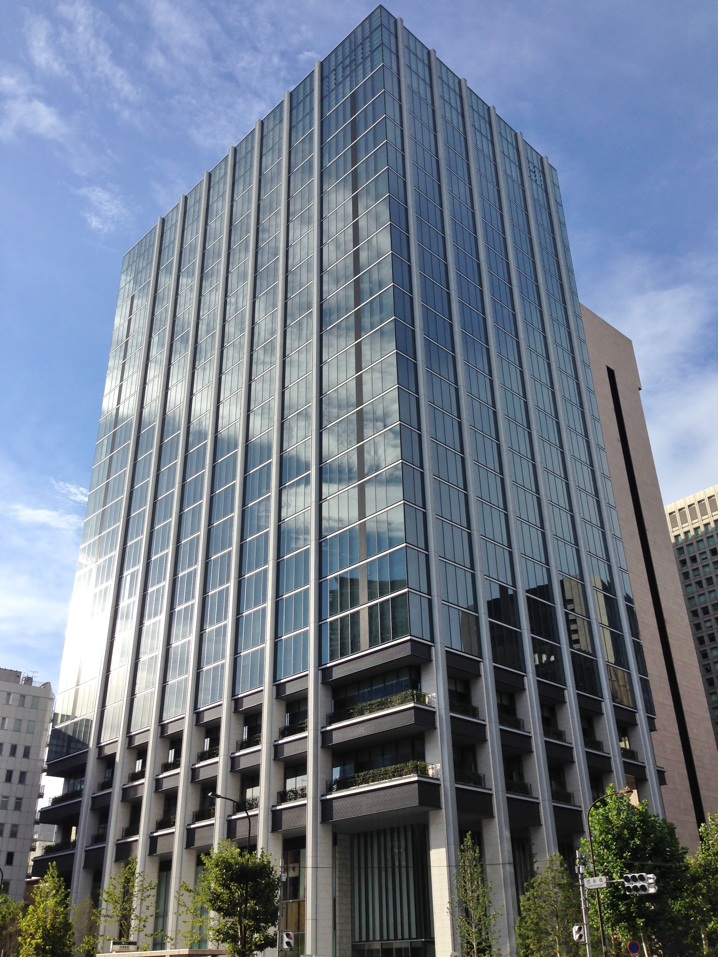 Nishi-Shimbashi Square, Minato-ku, Tokyo, Japan